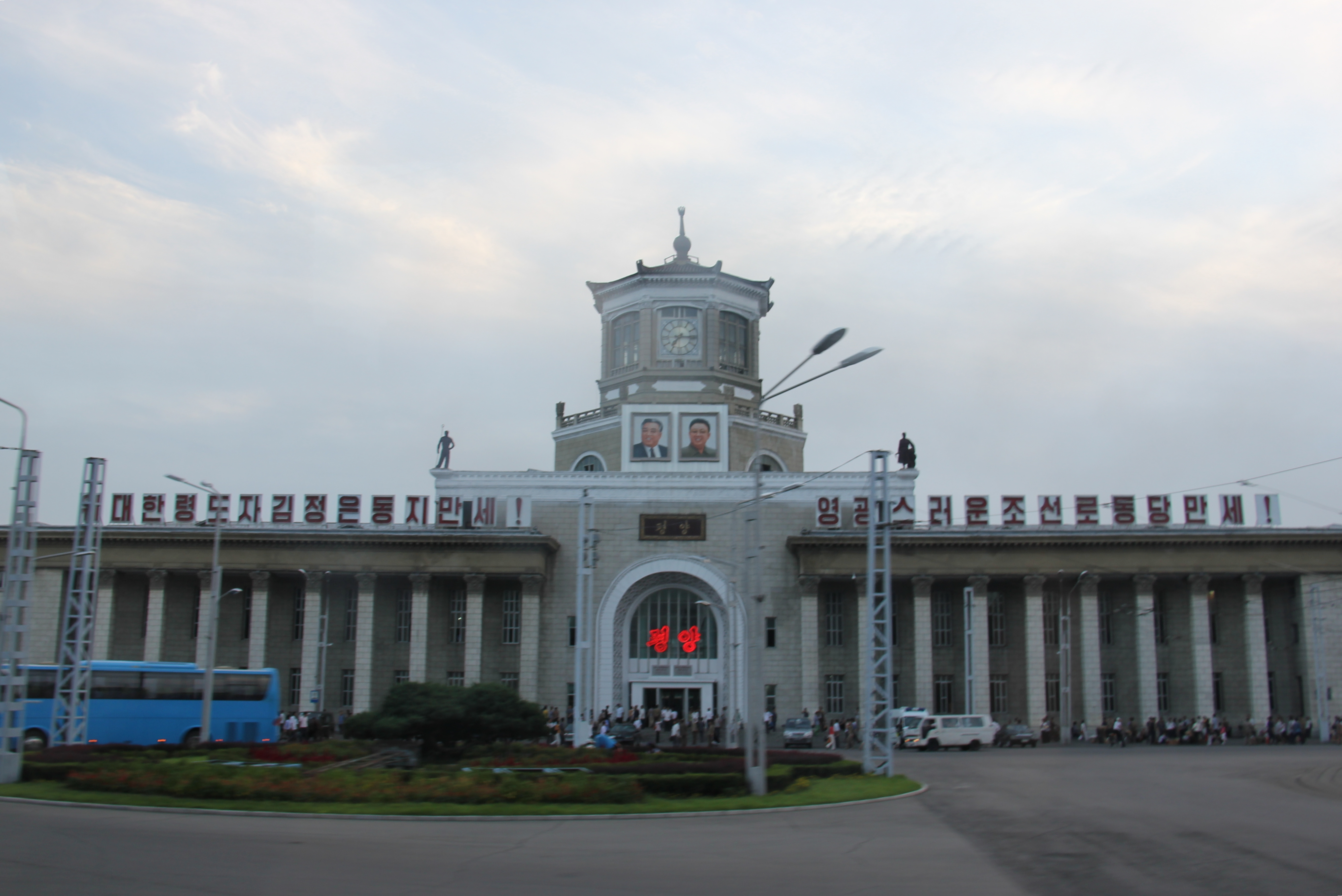 Pyongyang Station